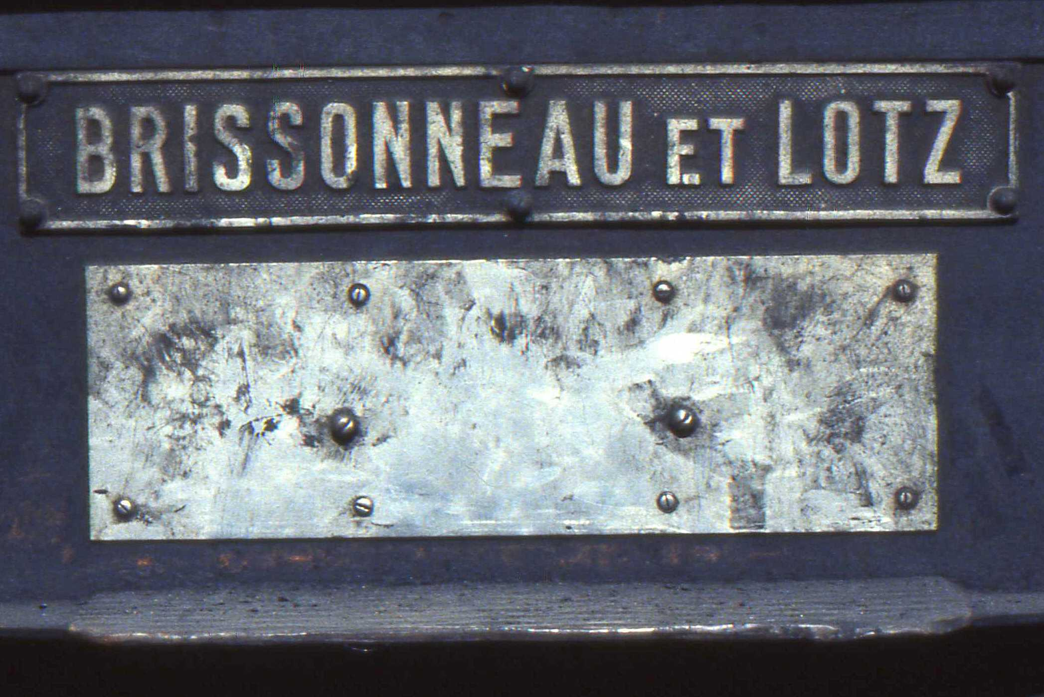 Photo 3a. Plaque constructeur sur la locomotive T4.